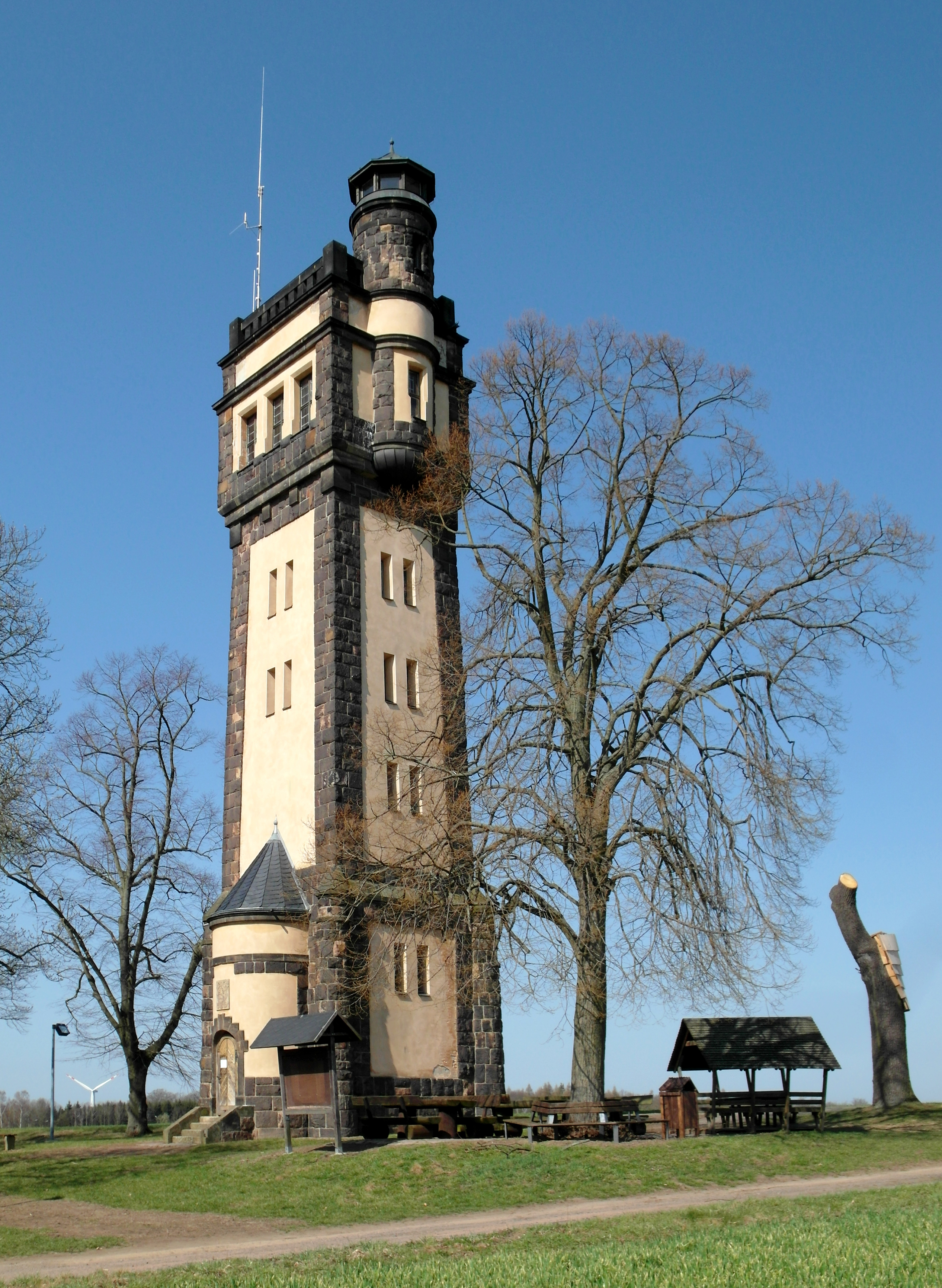 10.04.2018 09326König-Friedrich-August-Turm auf der Schillerhöhe bei Geringswalde, Heeresstraße (GMP: 51.083245,12.899631)1907 wurde der vom Chemnitzer Architekten Hans-Paul Wingen entworfene Turm eingeweiht. König Friedrich August III. machte im Frühjahr des gleichen Jahres auf der Durchreise im Ort Station. Zum Andenken erhielt der Turm seinen Namen.[SAM5108.JPG]20180410255DR.JPG(c)Blobelt